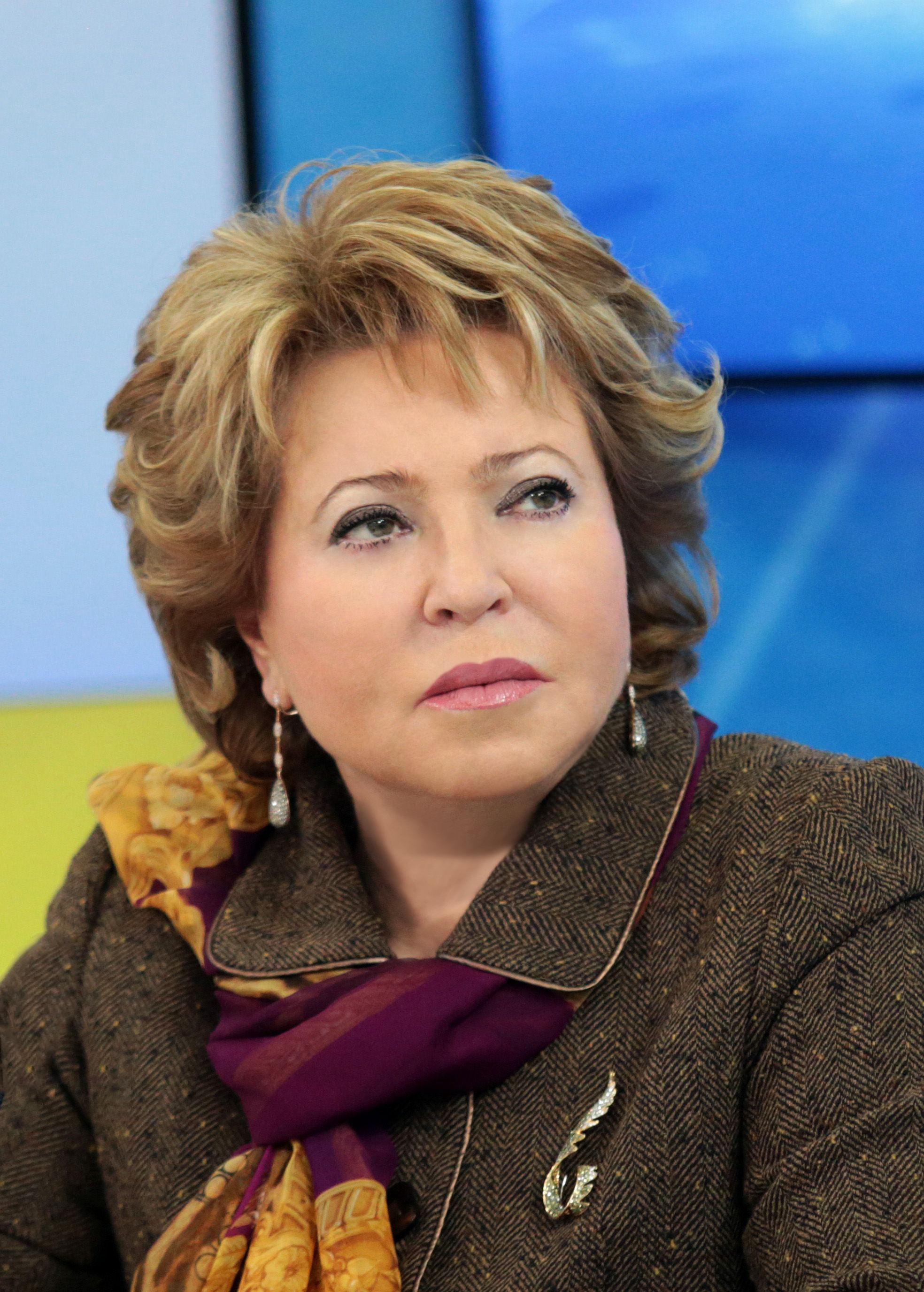 Председатель Совета Федерации Федерального Собрания Российской Федерации